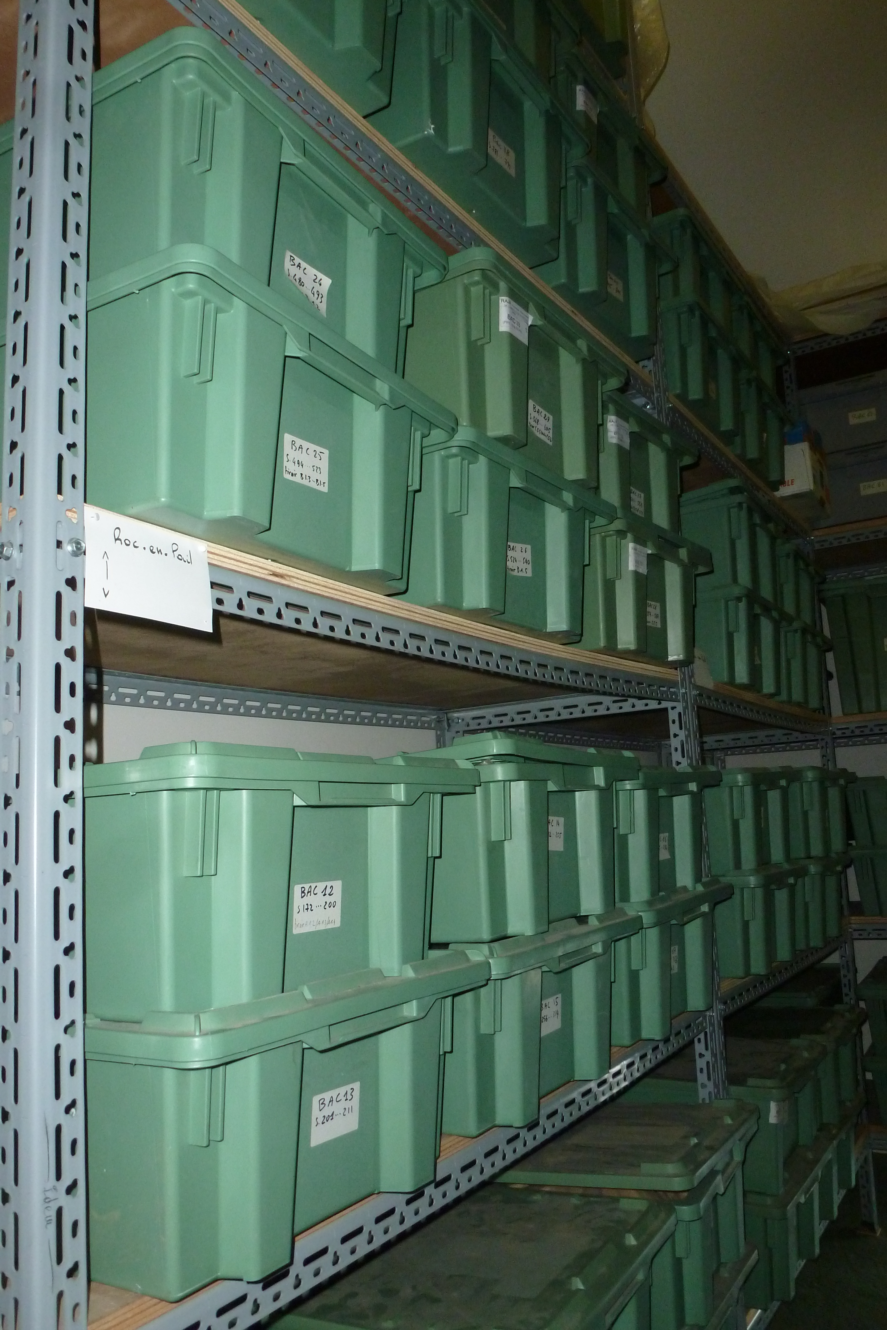 Étagères dans la réserve de préhistoire, Muséum d'Angers